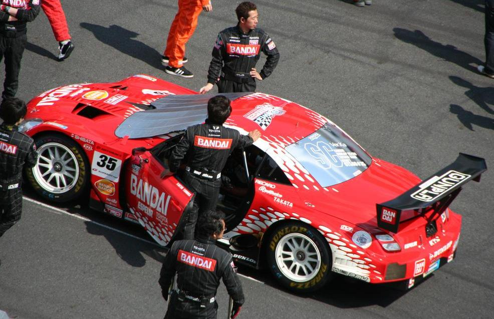 Lexus SC 430 Bandai SuperGT racer